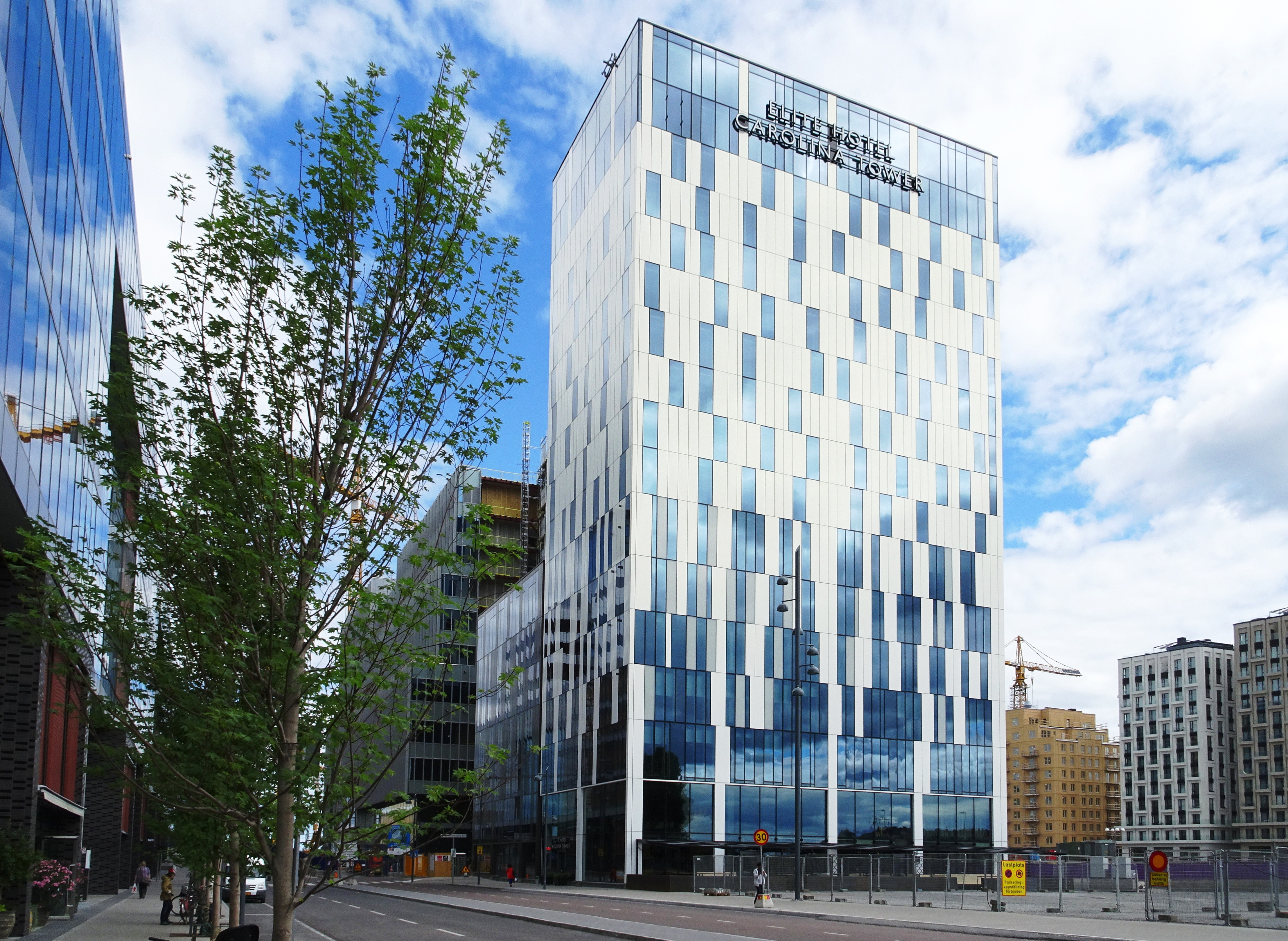 Elite Hotel Carolina Tower i Solna